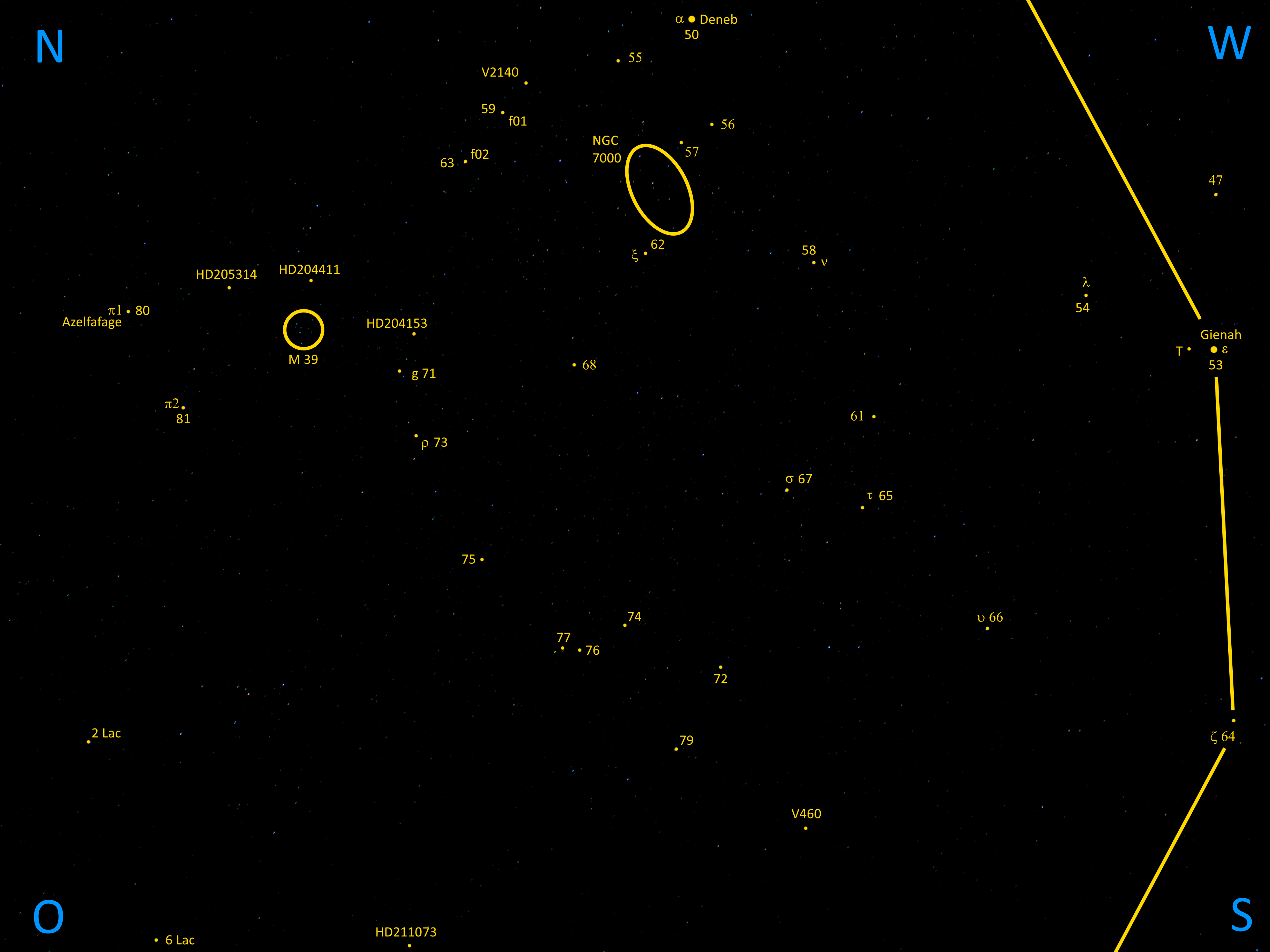 Zur Lage vom Sternhaufen Messier 39 im Sternbild Schwan mit Kennzeichnung der hellsten Sterne in der Umgebung. Deneb im Bürzel des Sternbilds ist oben in der Bildmitte, der rechte Flügel ist am rechten Bildrand zu sehen, Norden ist links oben, Süden rechts unten. Links unten (im Osten) sind bereits Sterne des Sternbilds Eidechse (Lacerta) zu sehen. Animation: Stehbild ohne Kennzeichnung